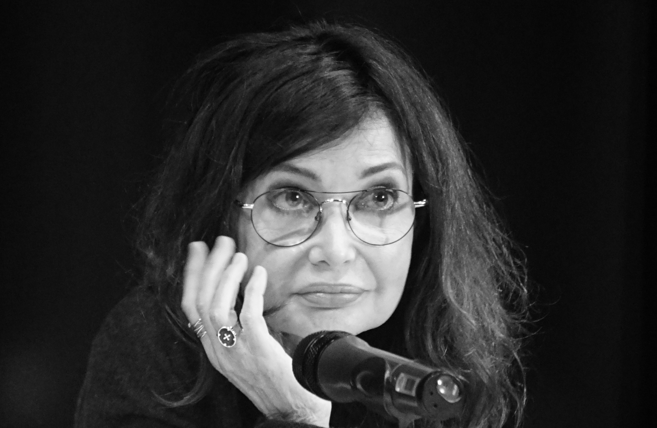 lors de la Nuit de la lecture à Reims.